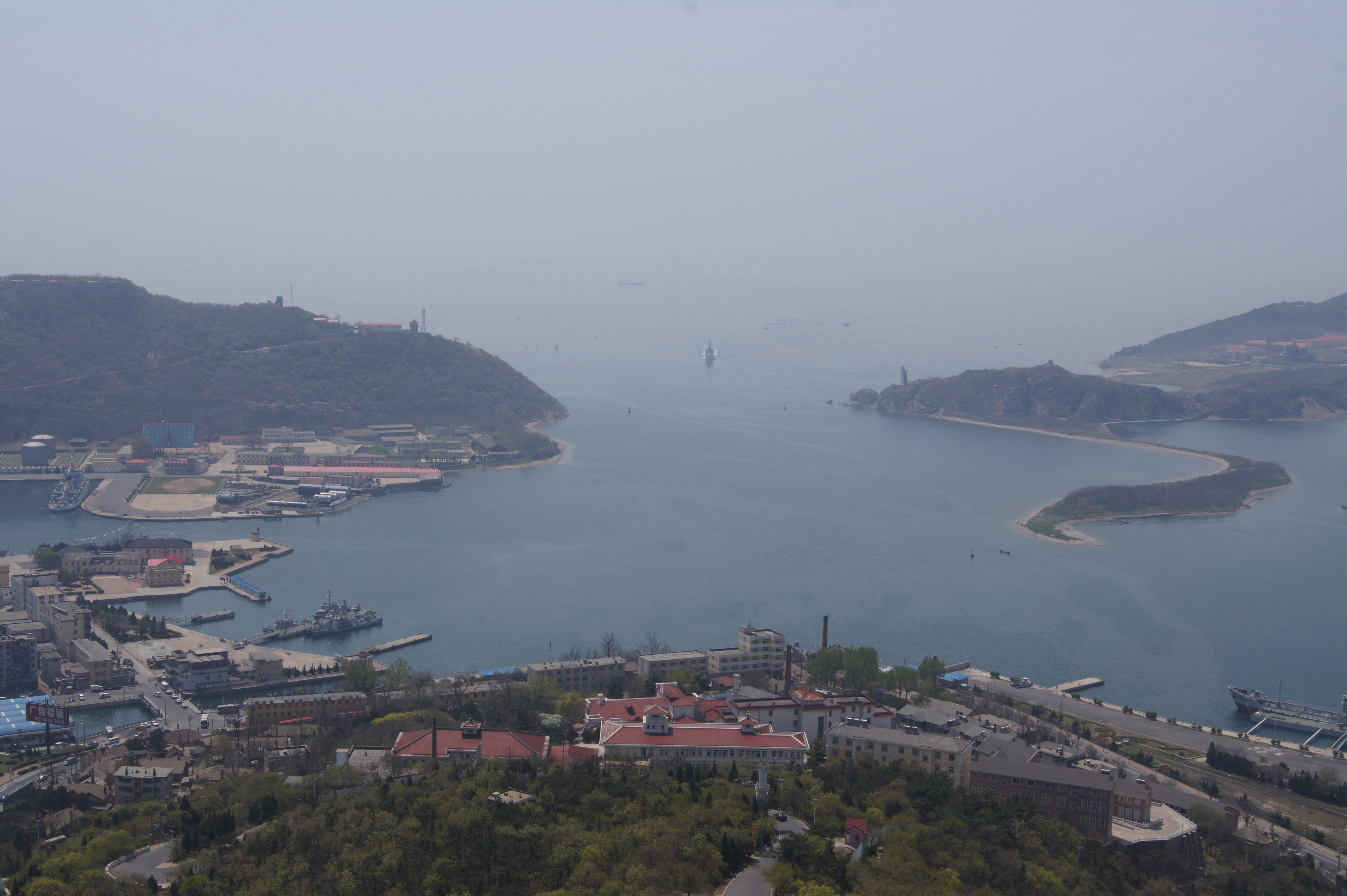 半島と半島に挟まれた海域が旅順口。旅順港閉塞作戦にて閉塞の対象となったエリア